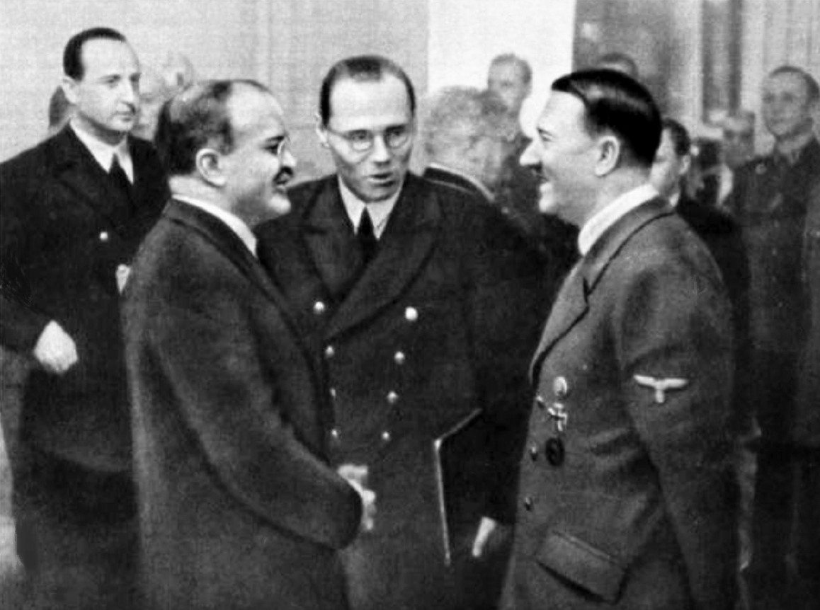 Берлин. Имперская канцелярия. На фото слева направо Вячеслав Молотов, Густав Хильгер, Адольф Гитлер